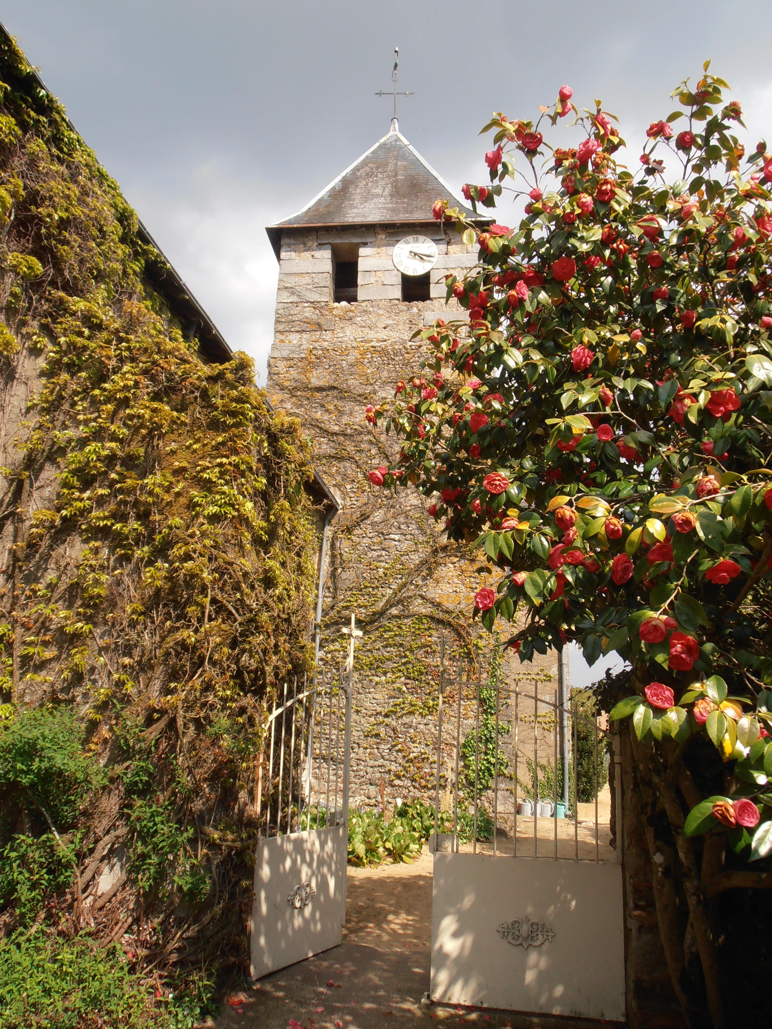 L'entrée du cimetière et le clocher.